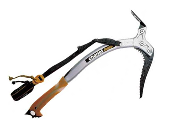 Klimijsbijl (klimmateriaal)